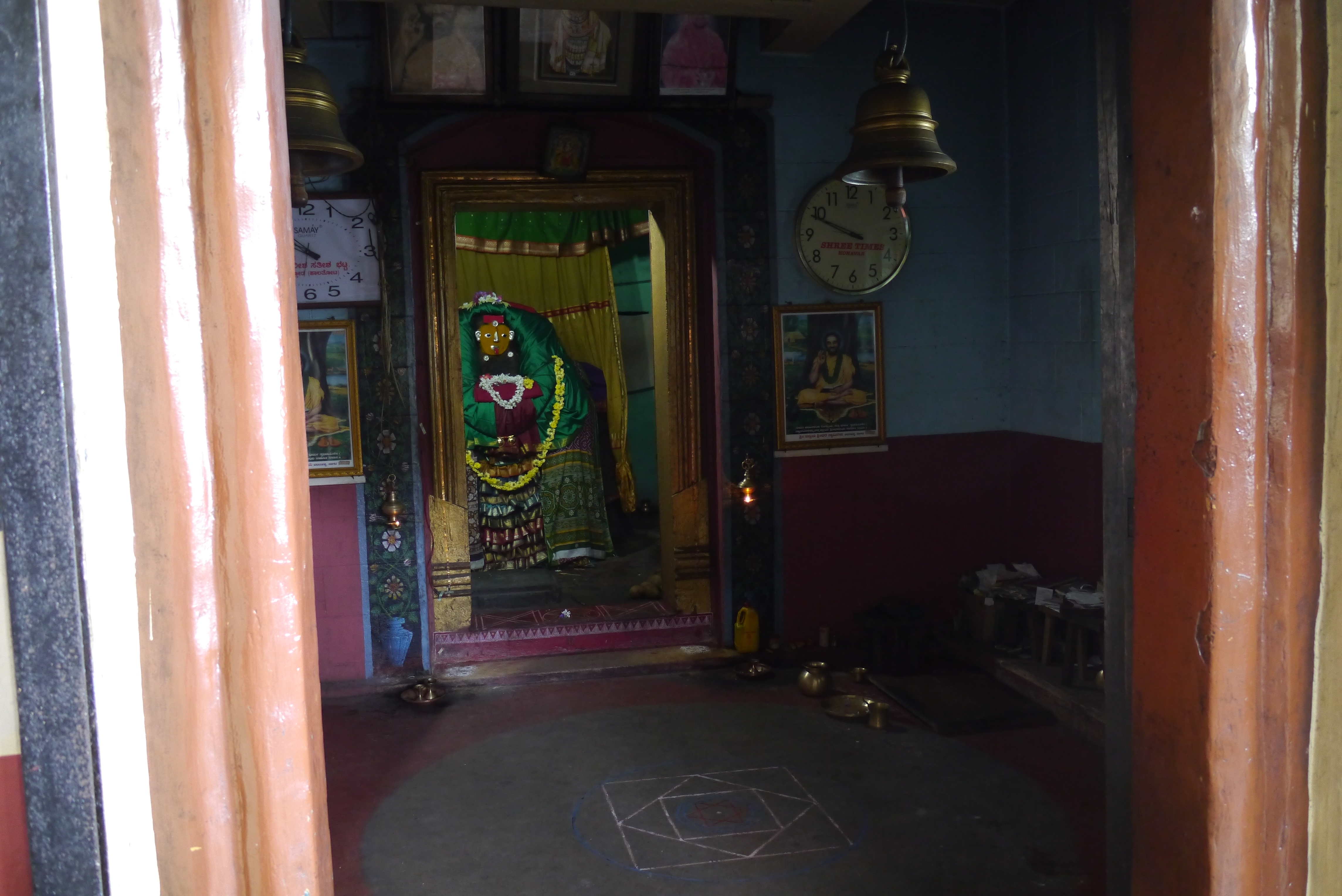 Sri Karikana Parameshwari Temple